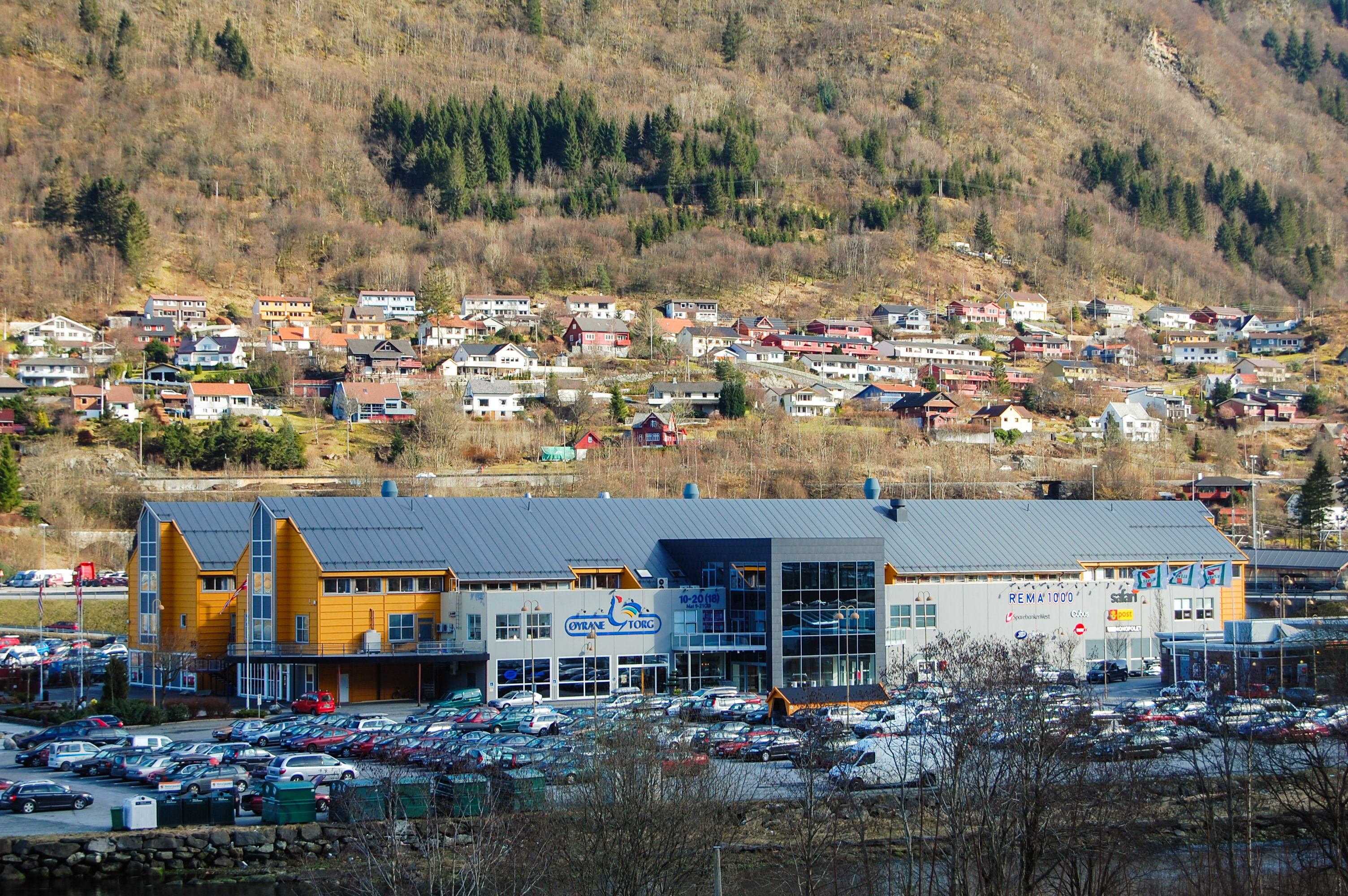 Bilde av Øyrane Torg i Arna